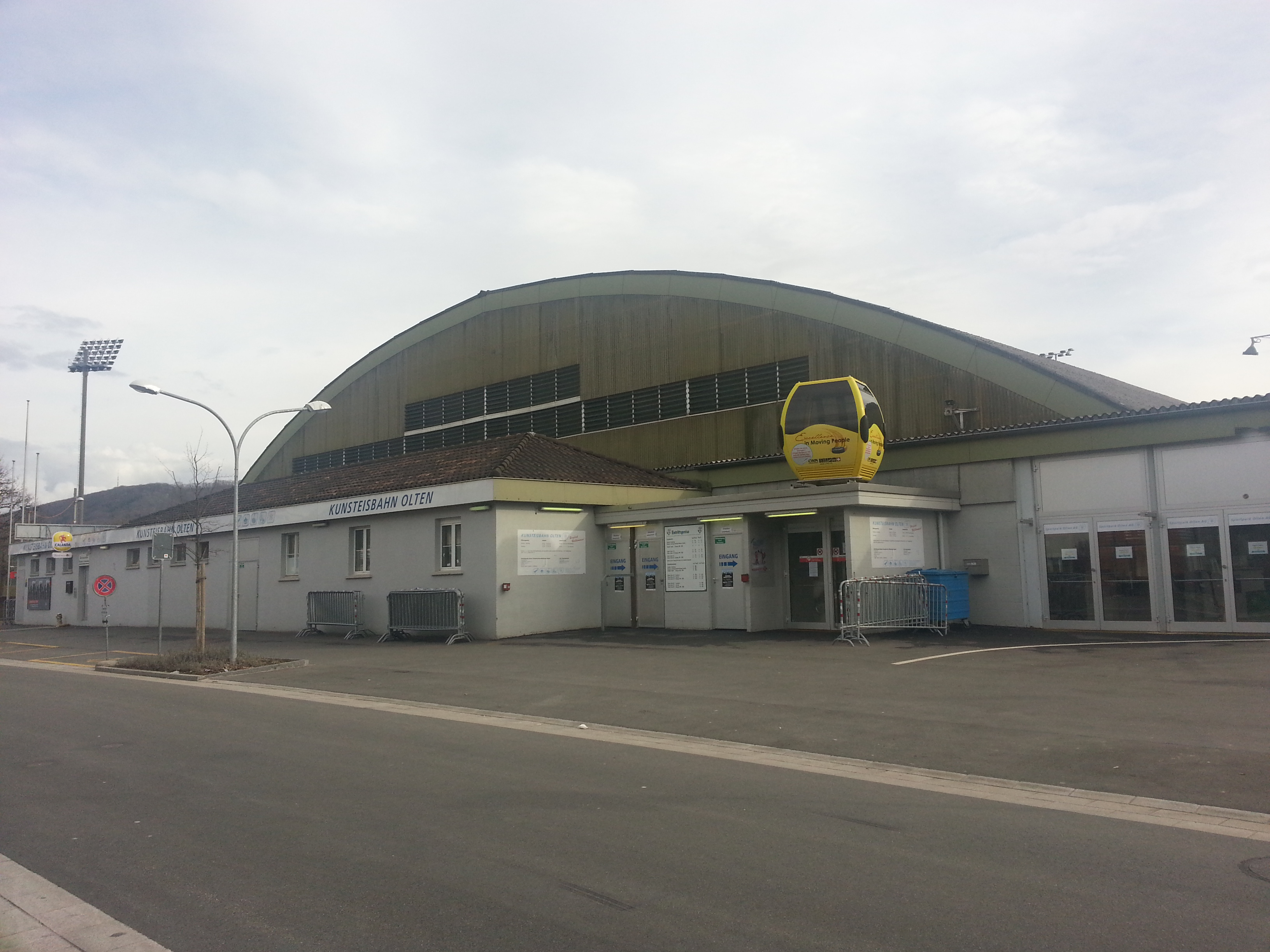 Aussenansicht der Kunsteisbahn Kleinholz